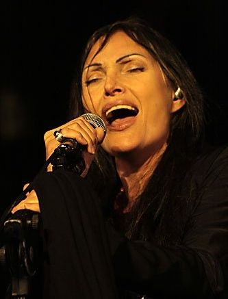 Anna Oxa